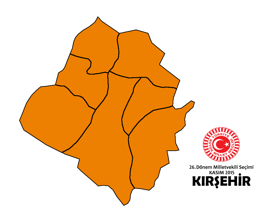 Kasım 2015 Seçimleri